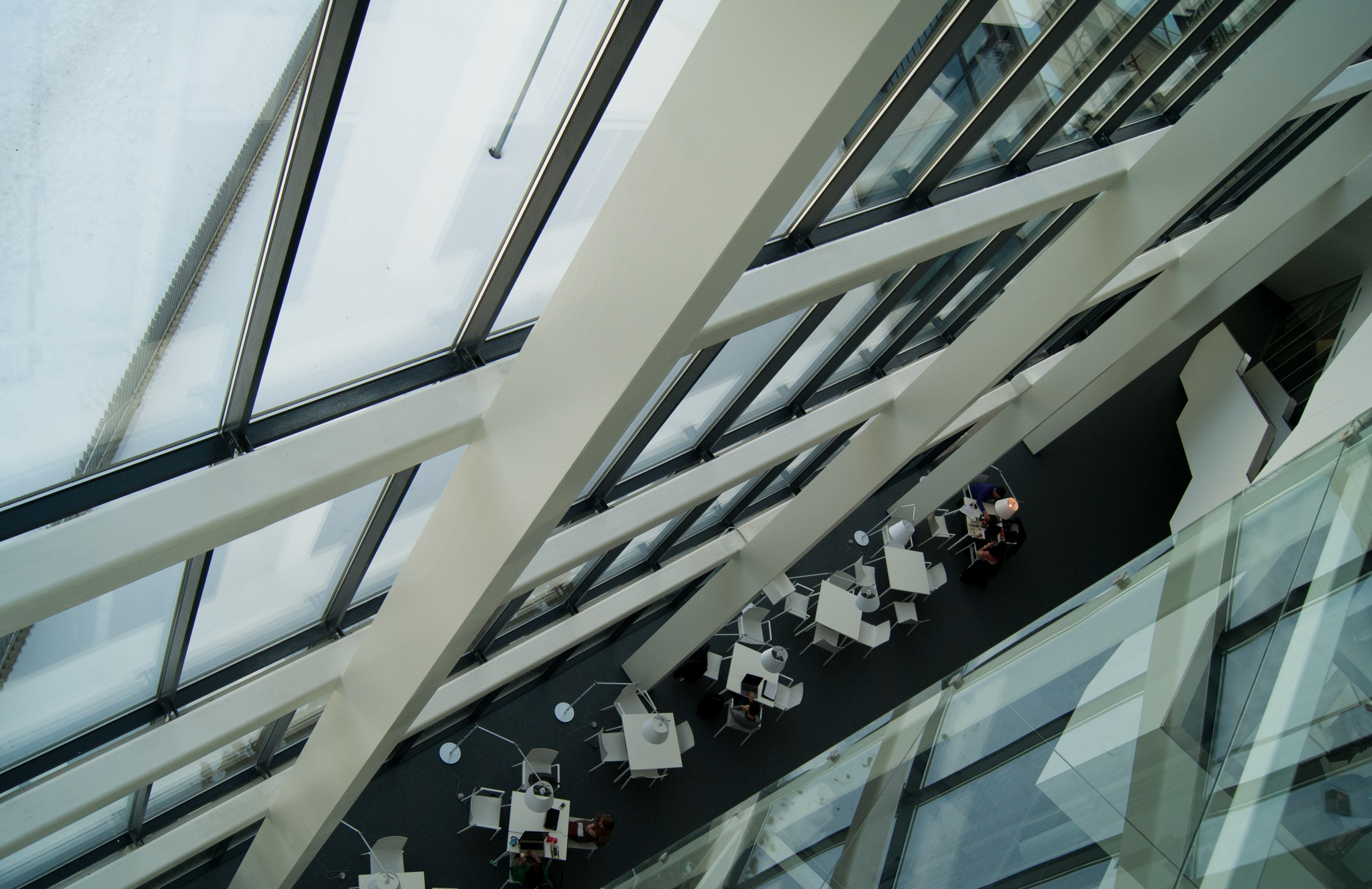 Inside Vilnius University Library, Vilnius, Lithuania